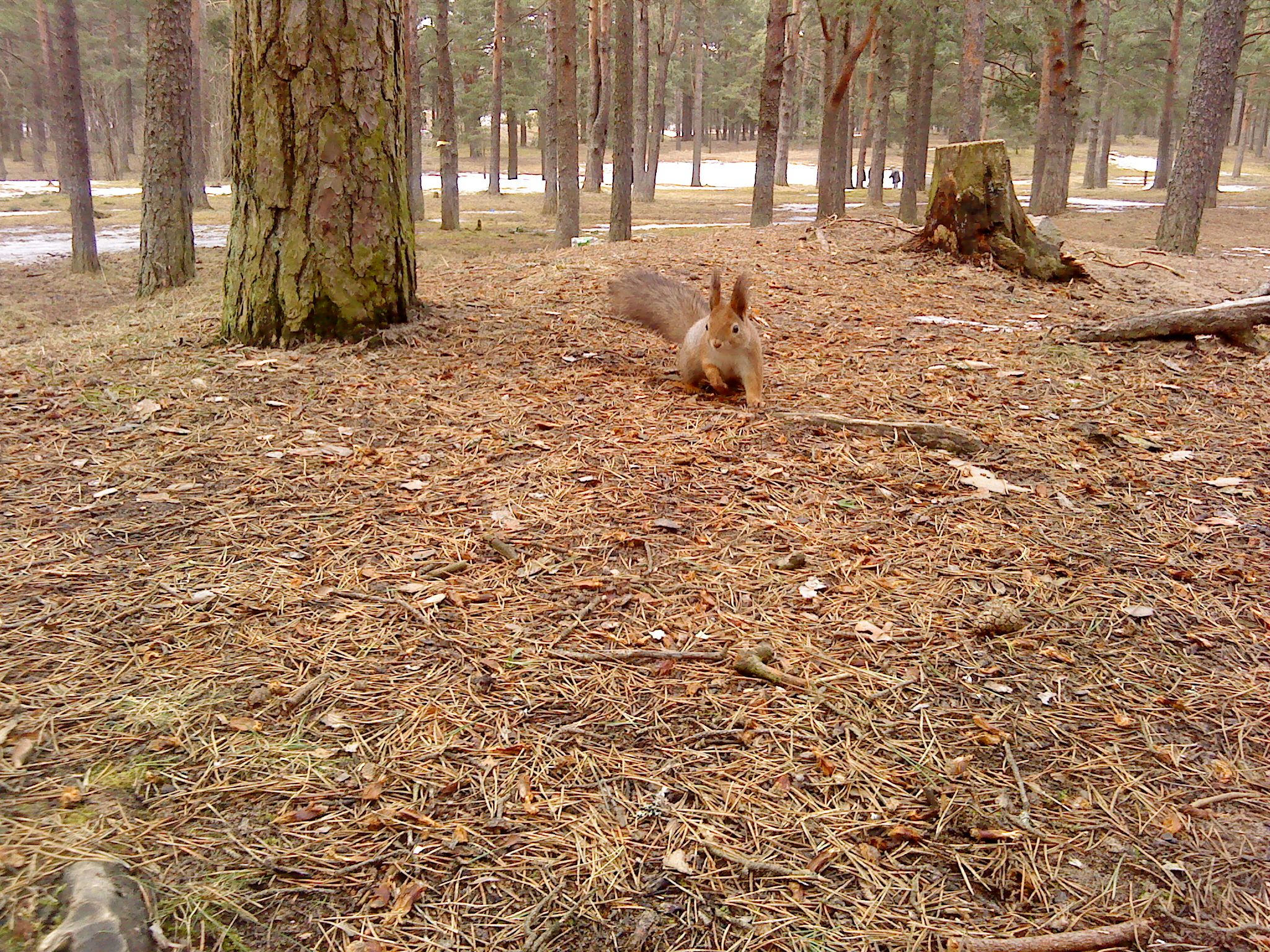 Orav Sütiste pargis.